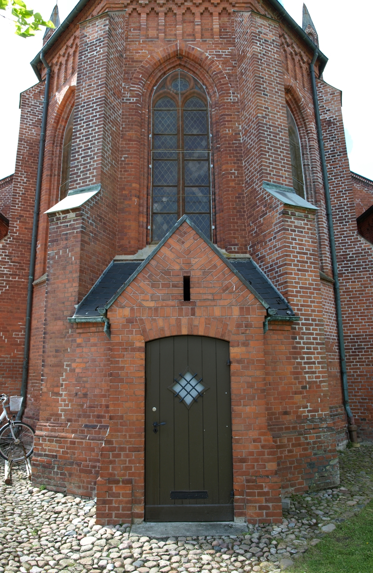 polygonale Aspis der Marienkirche Boizenburg/Elbe, zweibahnige Spitzbogenfenster im Stil eines Maßwerkfenster